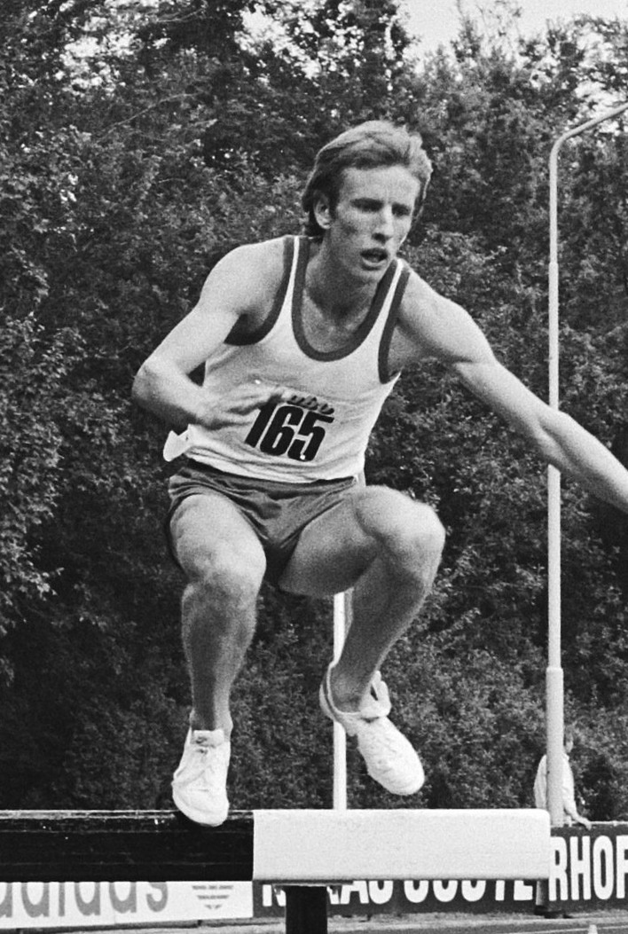 Winnaar steeple-chase Hans Koeleman (nummer 165) in aktie